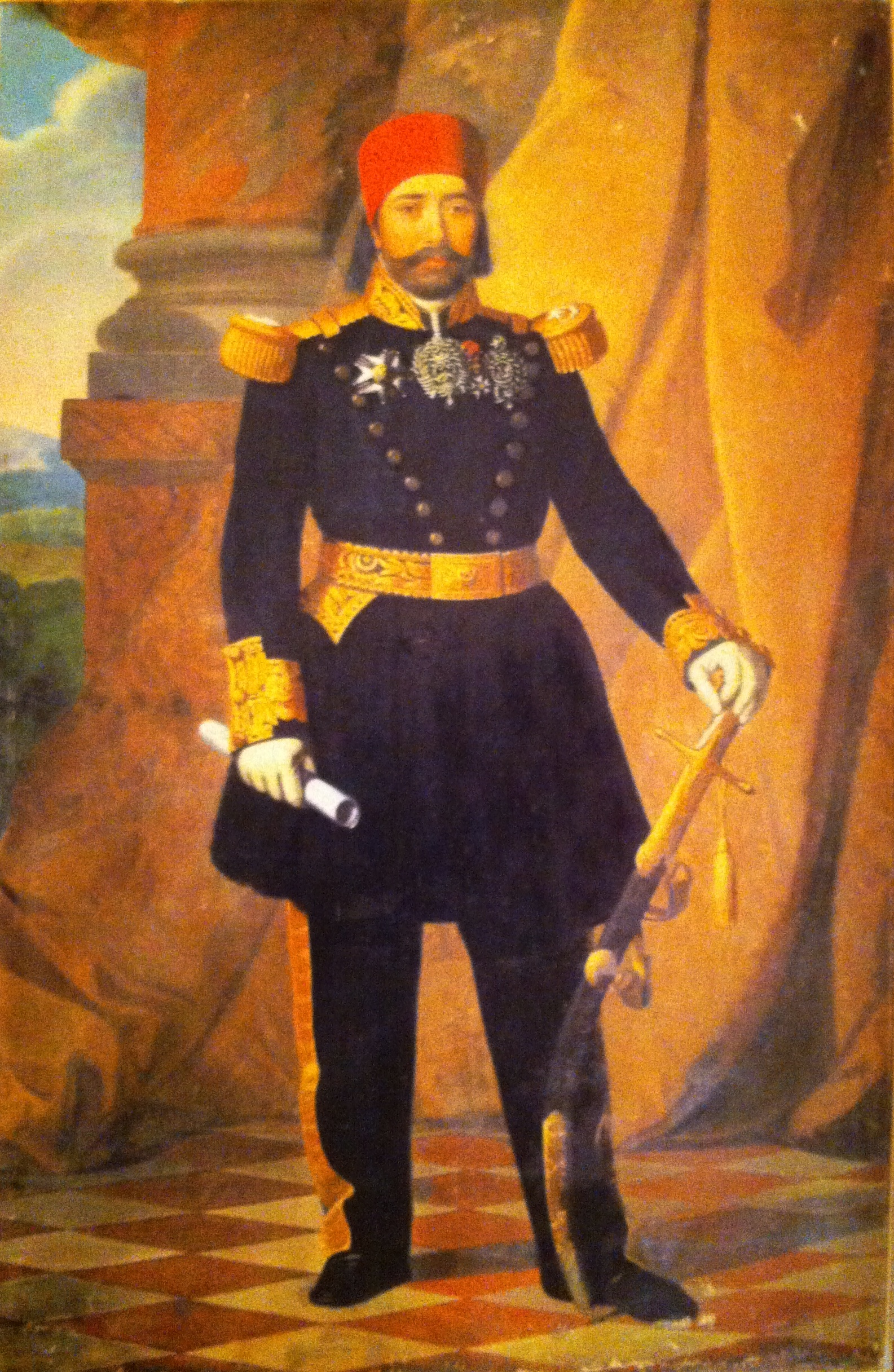 Mustapha Khaznadar, ministre des Finances de la régence de Tunis puis grand vizir de 1855 à 1873